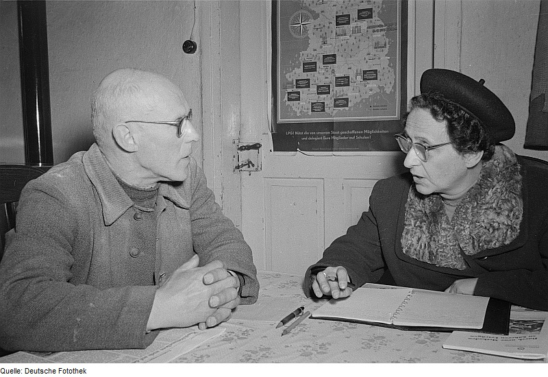 Original image description from the Deutsche FotothekCotta. Mitarbeiter der Staatlichen Kunstsammlungen Dresden bei Recherchearbeiten zu den während des 2. Weltkrieges ausgelagerten Kunstwerken in den Rottwerndorfer Brüchen. Ruth Seydewitz im Gespräch mit einem Steinbrucharbeiter